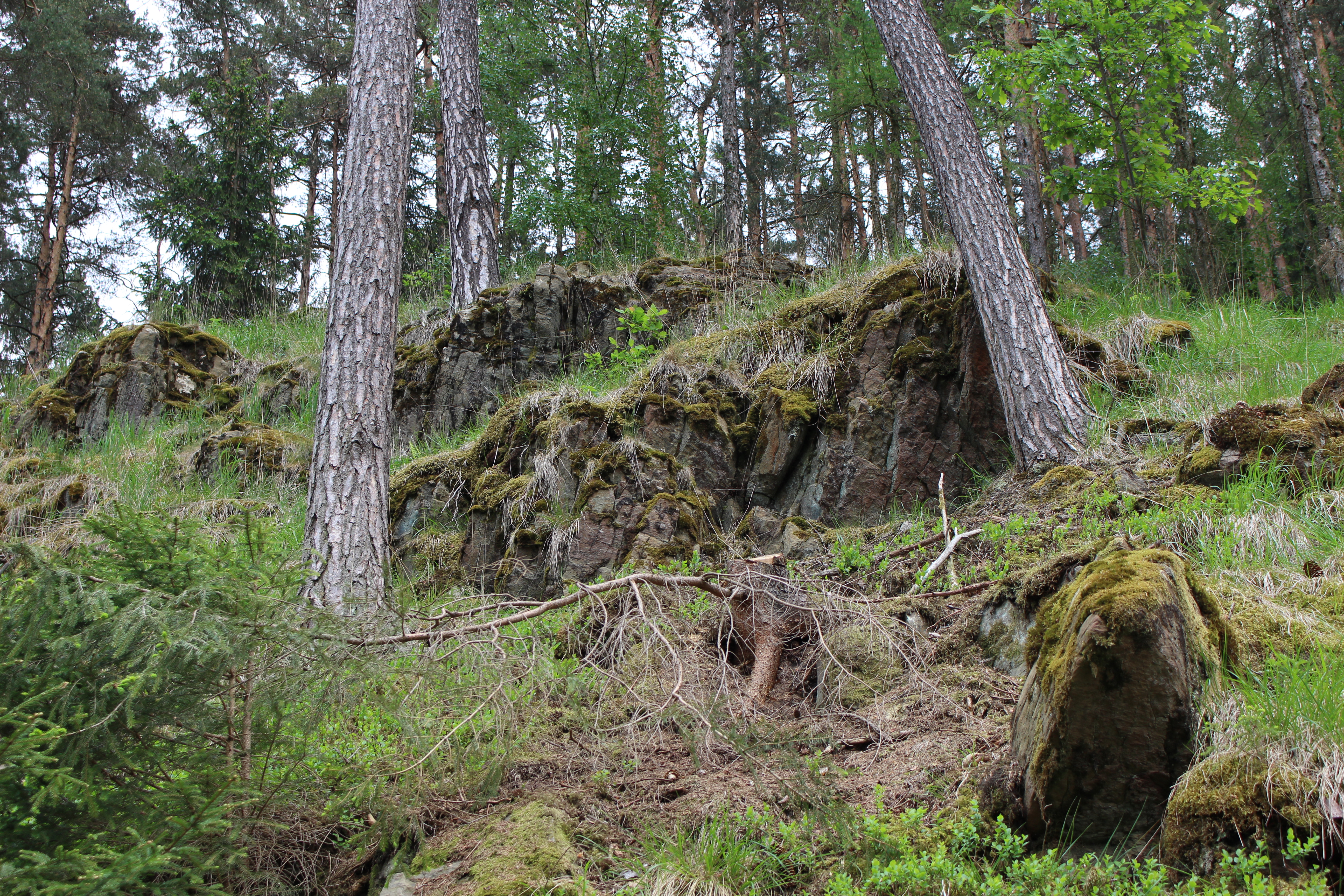 přírodní památka Rojetínský hadec, k.ú. Rojetín, okres Brno-venkov, Jihomoravský kraj